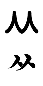 Korean Alphabet ㅆ(sang.si.ot)